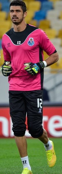 Фабіано під час виступів за Порту